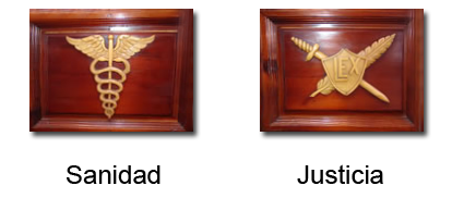 Especialidades Del Ejercito Del Ecuador